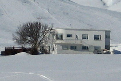 Bær og gamalt læknissetur í Svarfaðardal